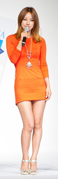 미국면화협회 주최 '코튼데이 2012'